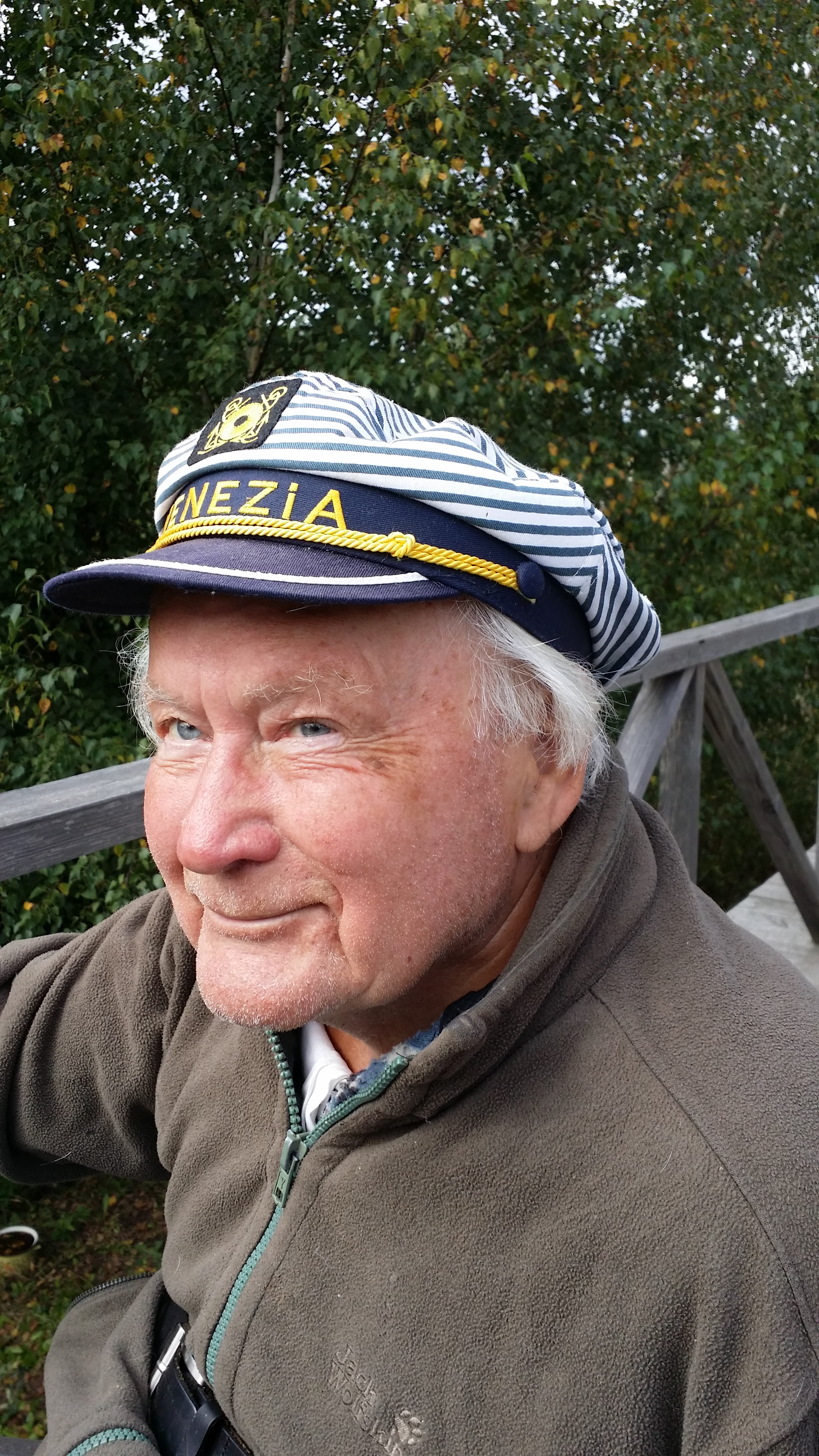 Последнее фото советского и российского искусствоведа Ю. И. Нехорошева